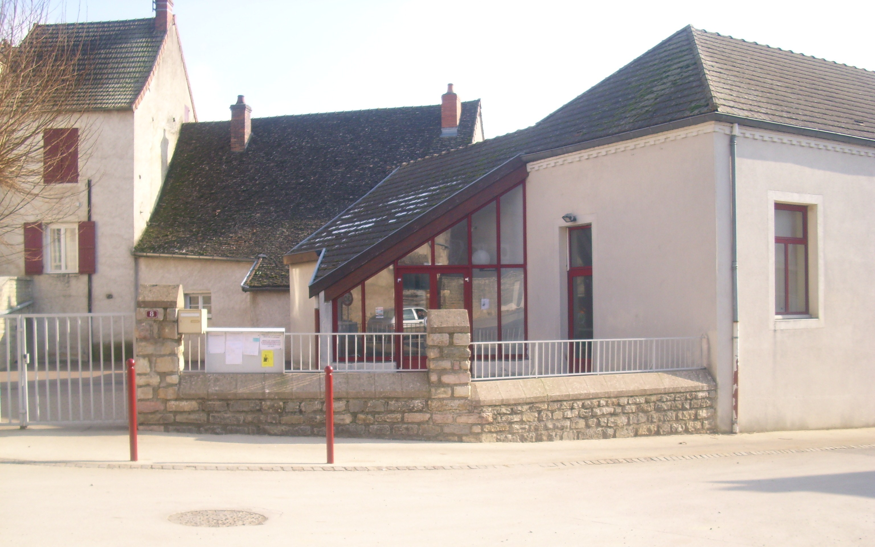 Ecole élémentaire de Jambles (71)